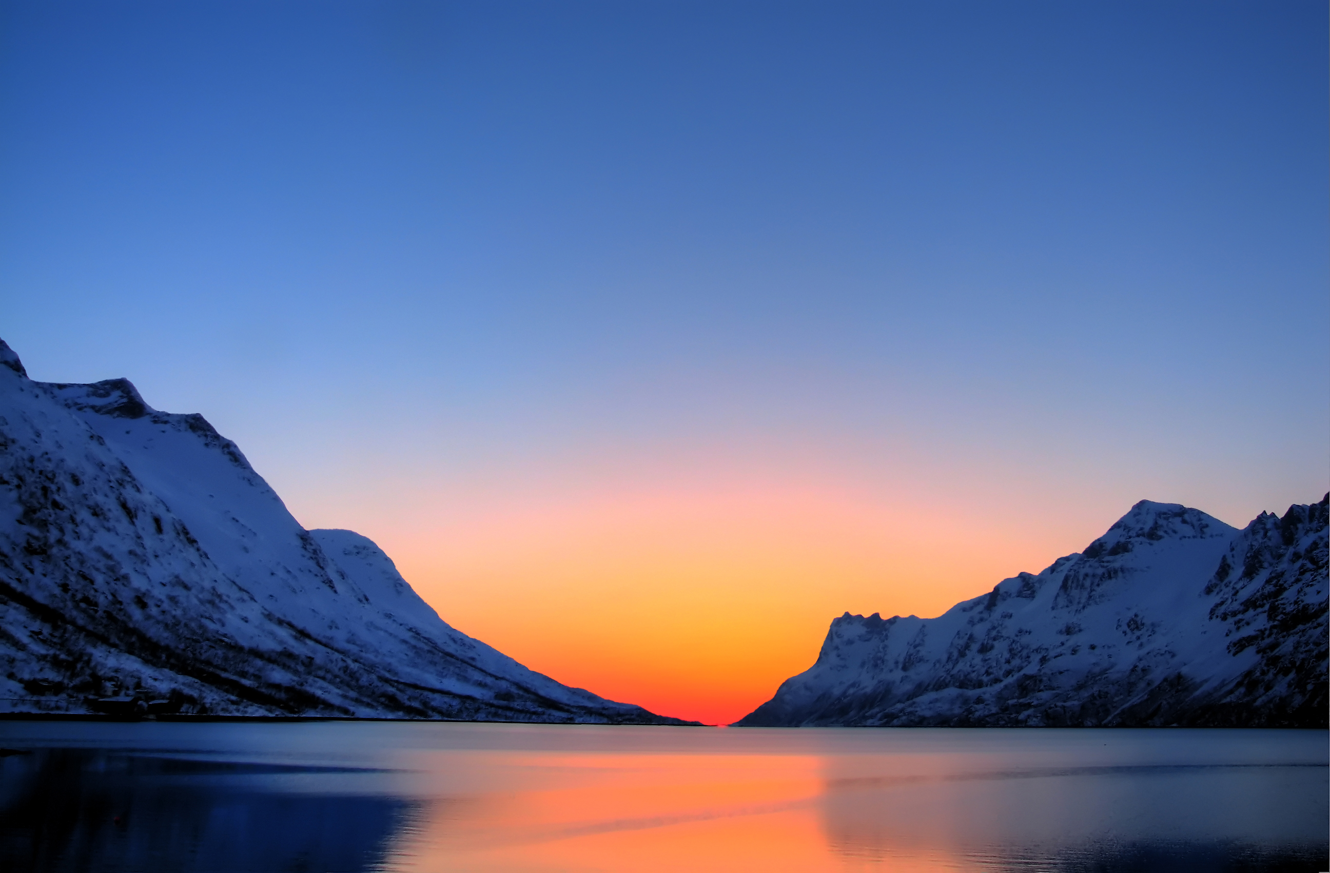 Arctic Sunset. Taken in Tromsø Kommune, Troms Fylke